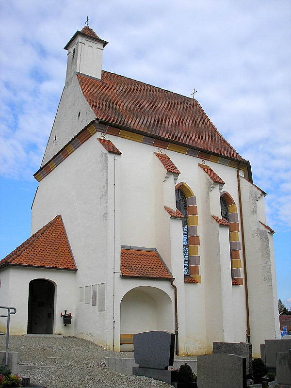 Friedhofskapelle zu den Vierzehn Nothelfern (Welden, Landkreis Augsburg, Bayerisch-Schwaben). Gesamtansicht von Süden. Eigene Aufnahme, Sept. 2007 / Cemetery chapel "Fourteen Holy Helpers" at Welden near Augsburg (Bavaria, Germany). Total view from the south. Own photo, Sept. 2007